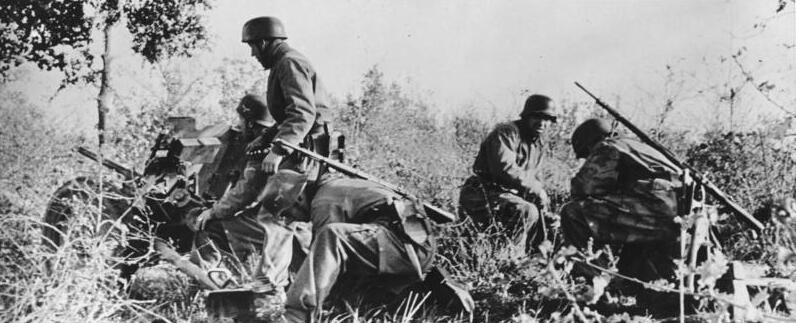 Der eiserne Ring unserer Fallschirmjäger und Grenadiere um den Landekopf Nettuno-Anzio. Fallschirmjäger-Pak ist gut getarnt in undurchdringlichem Gestrüpp aufgefahren und sichert gegen herannahende feindliche Panzer. PK.-Aufn.: Kriegsber. Thönessen [1944]